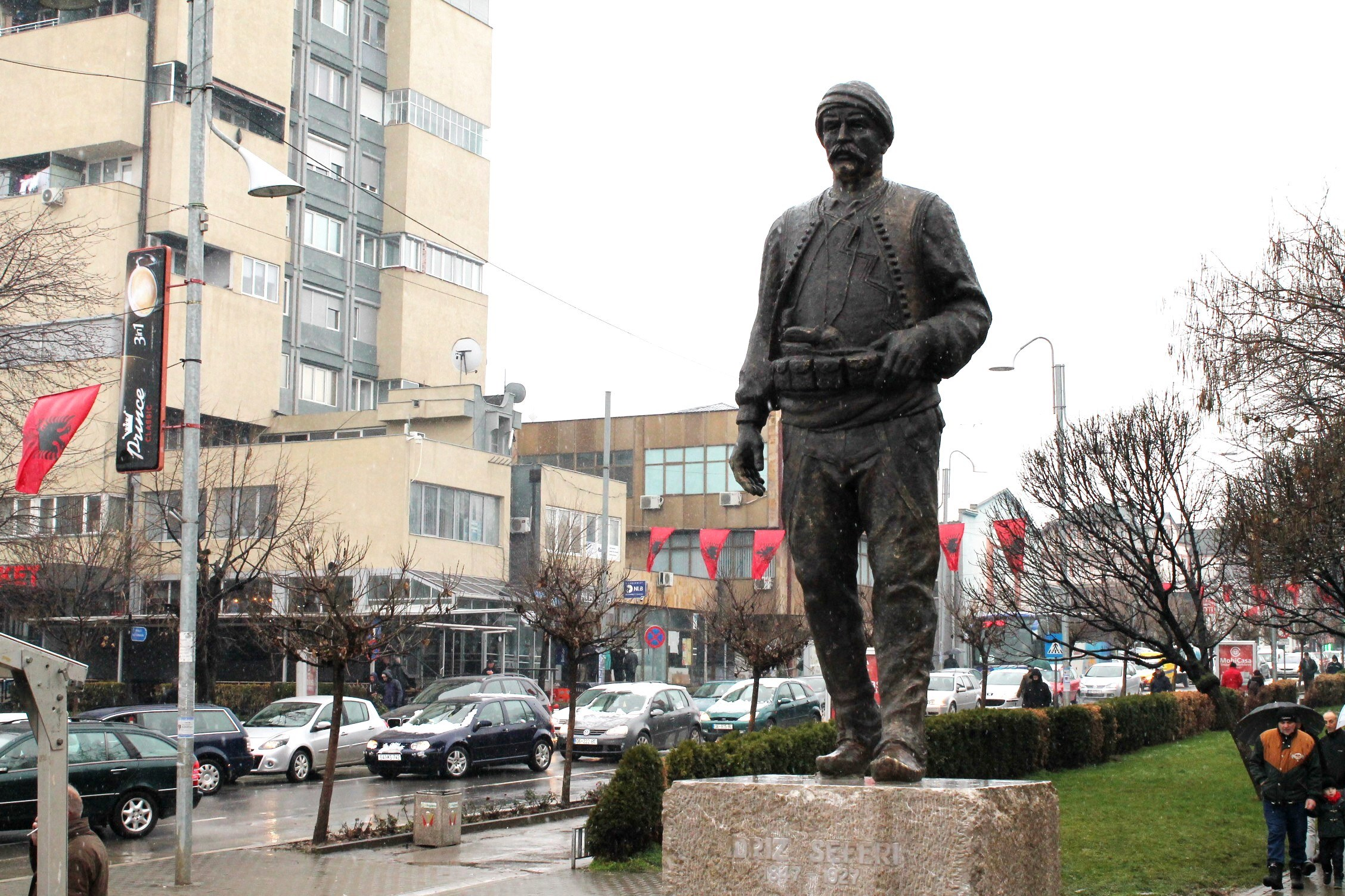 Shtatorja e Idriz Seferit në Gjilan